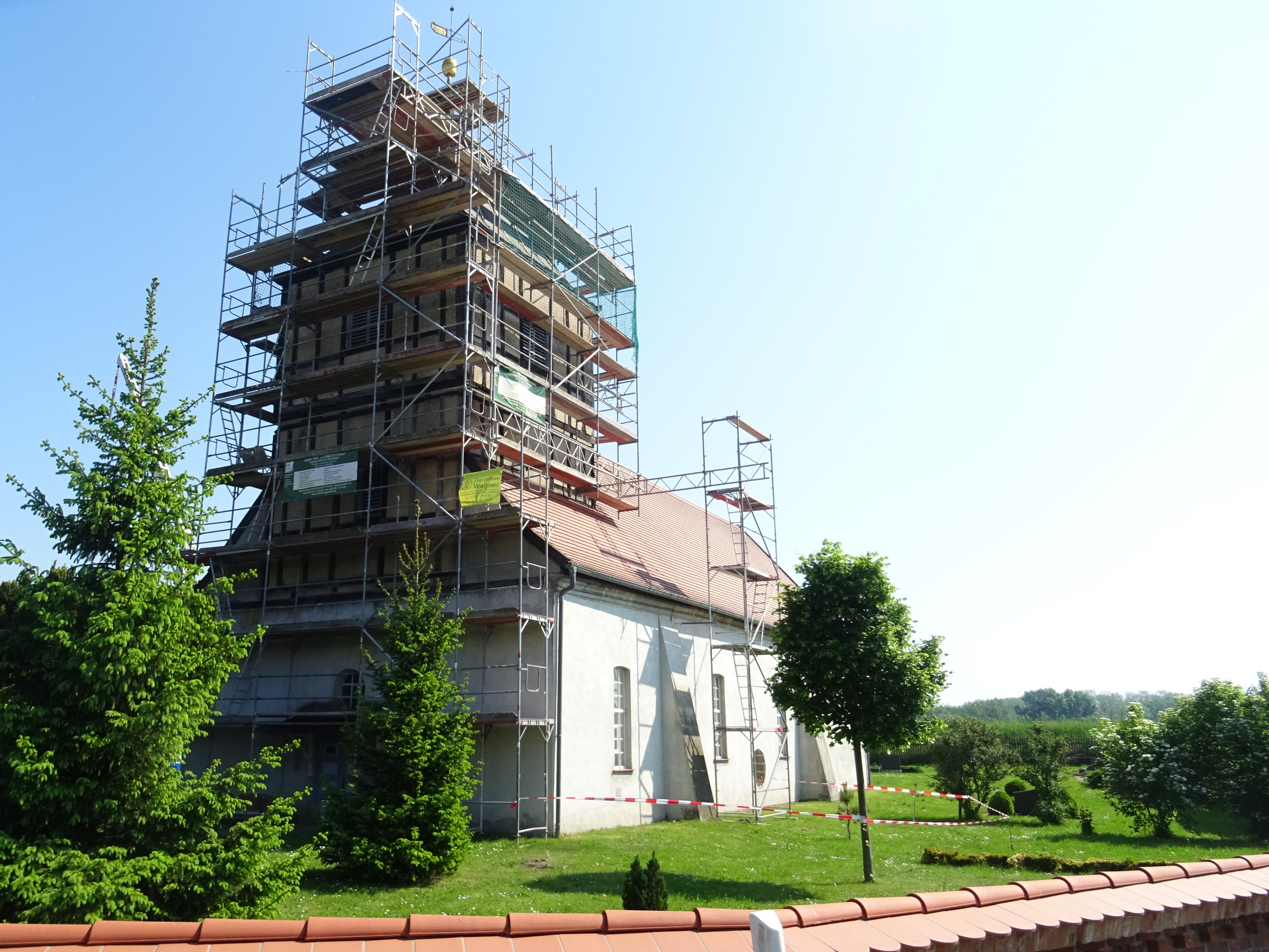 Wahrenberg, denkmalgeschützte Kirche